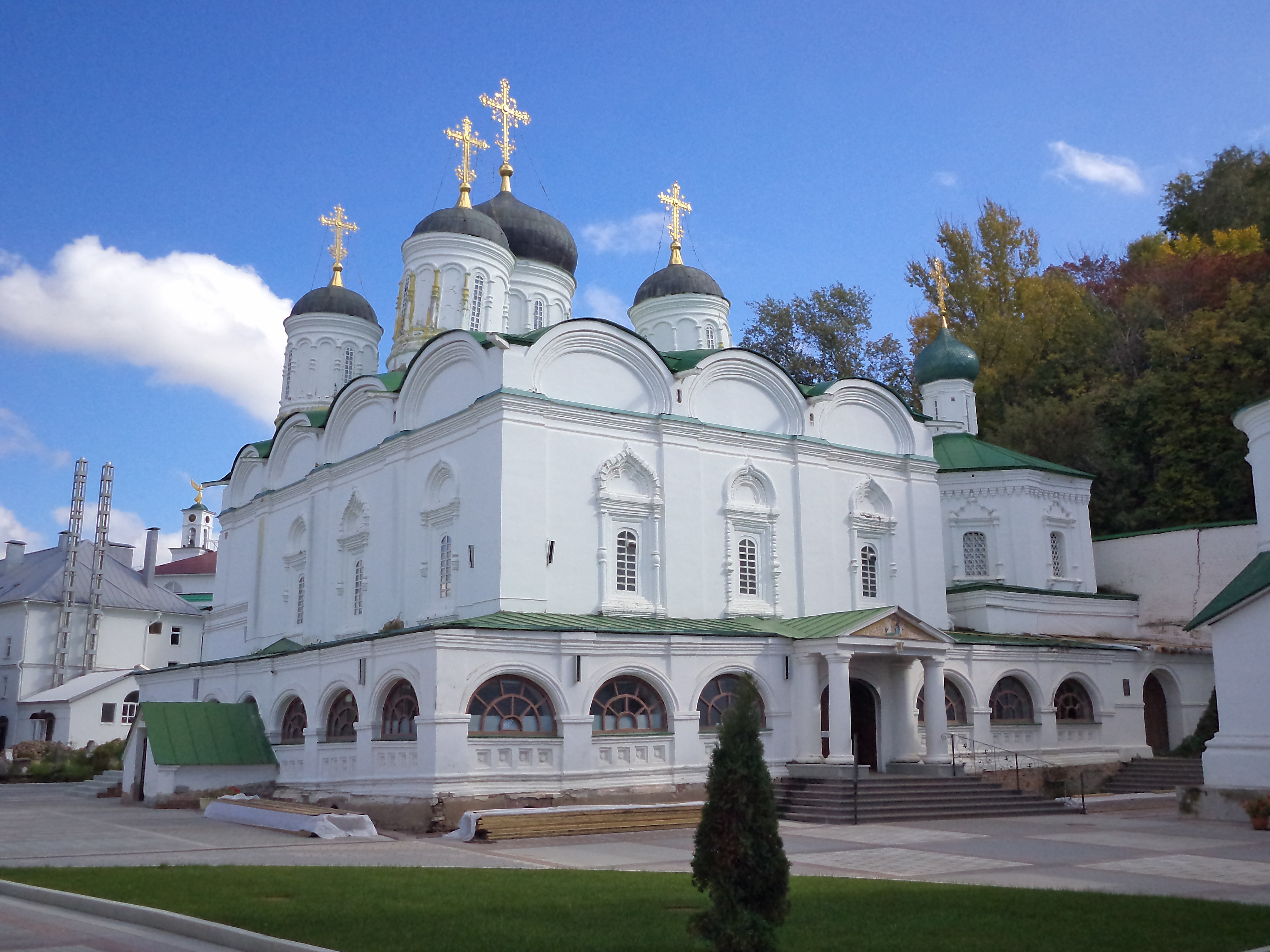 Собор Благовещения Пресвятой Богородицы: переулок Мельничный, 7в, Нижний Новгород, Нижегородская область